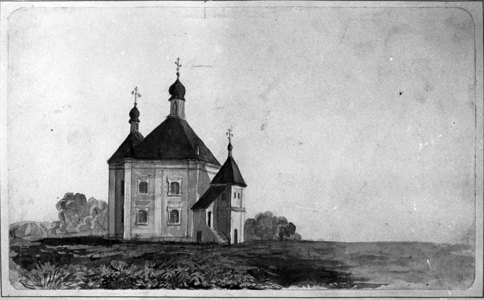 Беларуская (тарашкевіца): Ворша (Vorša), Куцейна (Kuciejna). Манастыр Яўленьня Гасподняга.